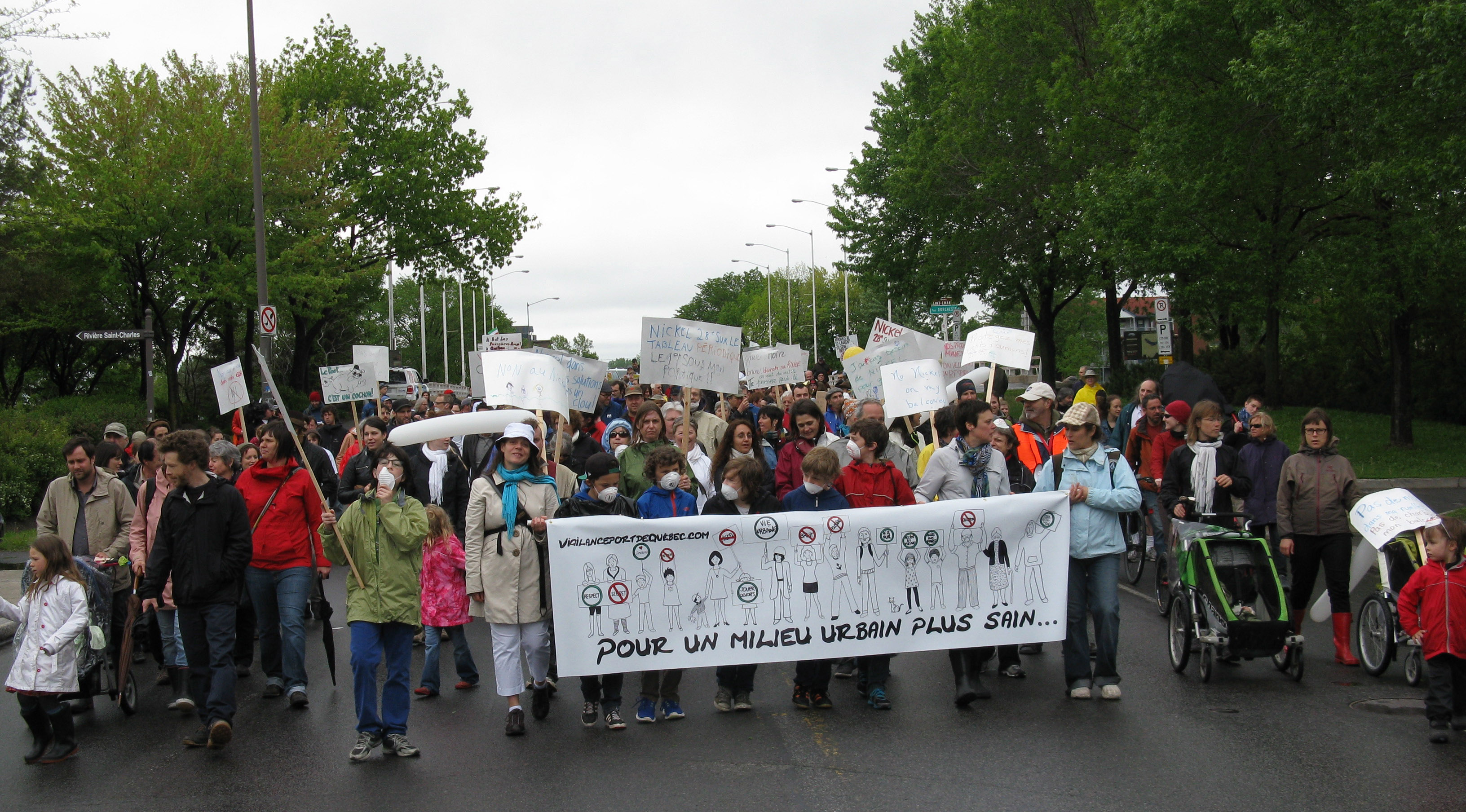 Manifestation citoyenne revendiquant le droit de vivre dans un milieu urbain plus sain, organisée par l'Initiative Citoyenne de Vigilance du Port de Québec.